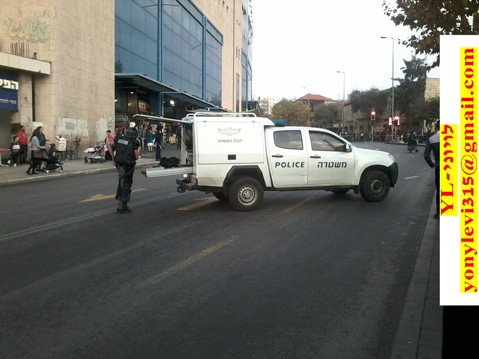 חבלן משטרה מטפל בחפץ חשוד במתחם התחנה המרכזית בירושלים